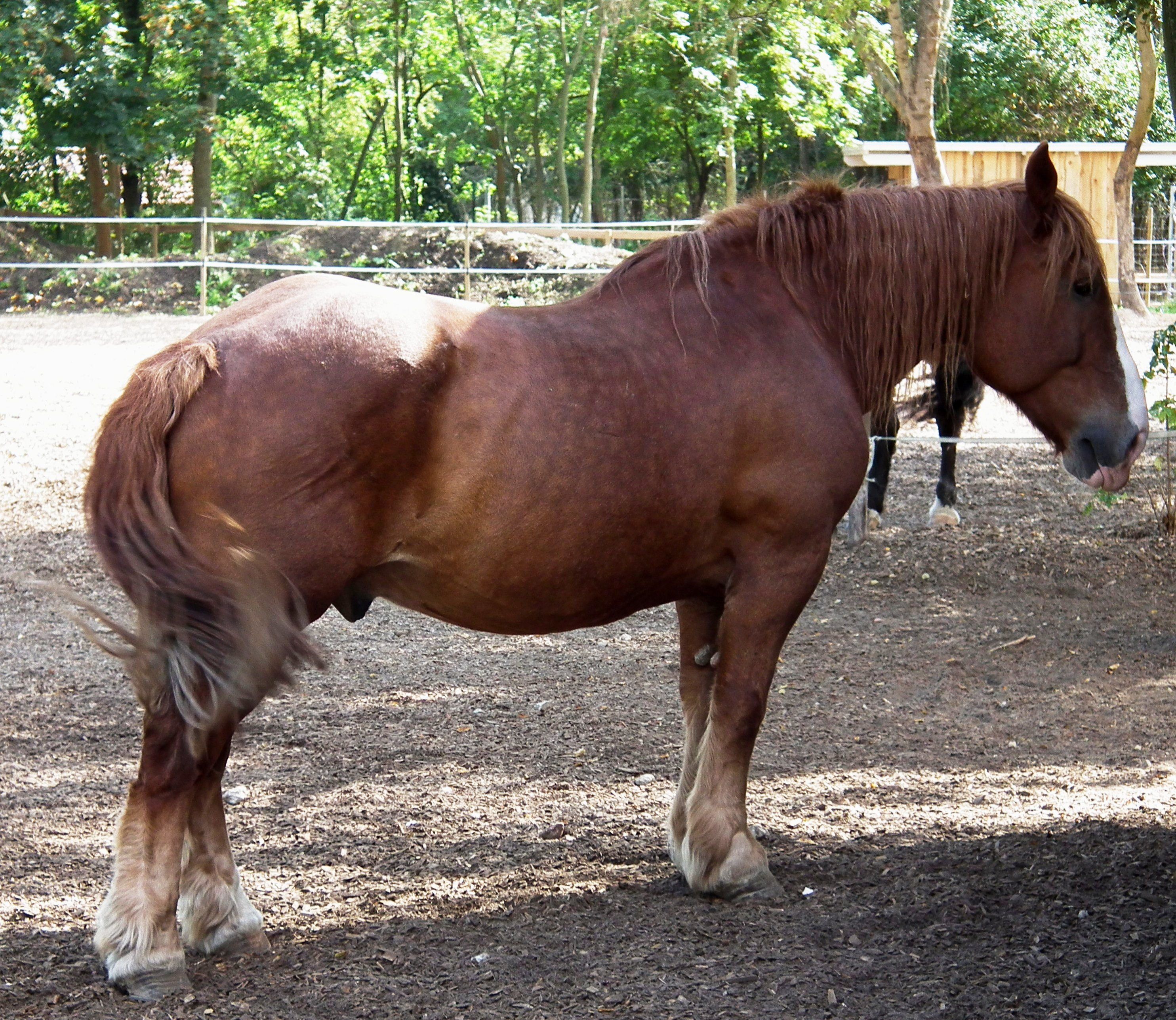 Pfalz Ardenner Kaltblut im Tiergarten Worms (Rheinland-Pfalz, Deutschland)